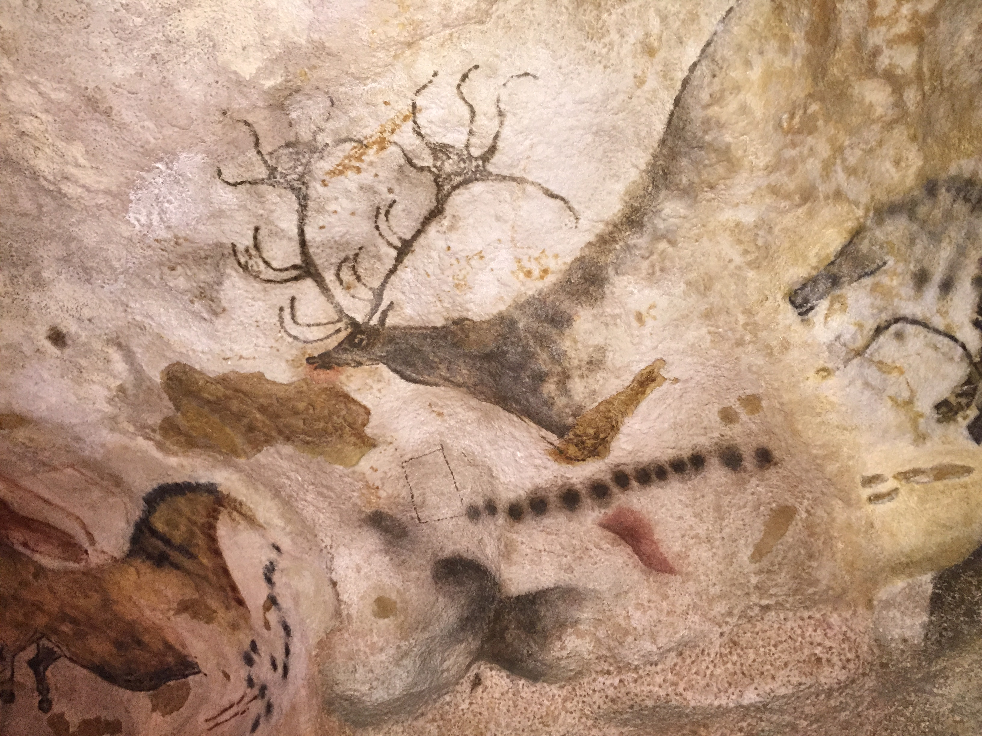 Intérieur de la grotte de Lascaux. Peinture rupestre représentant un élan.